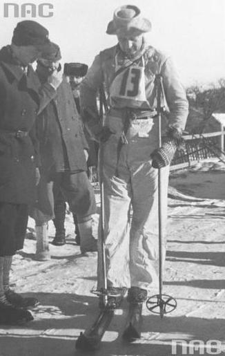 Podpułkownik Władysław Ziętkiewicz, wicedyrektor Państwowego Urzędu Wychowania Fizycznego i Przysposobienia Wojskowego na starcie II etapu marszu szlakiem huculskim II Brygady Legionów.